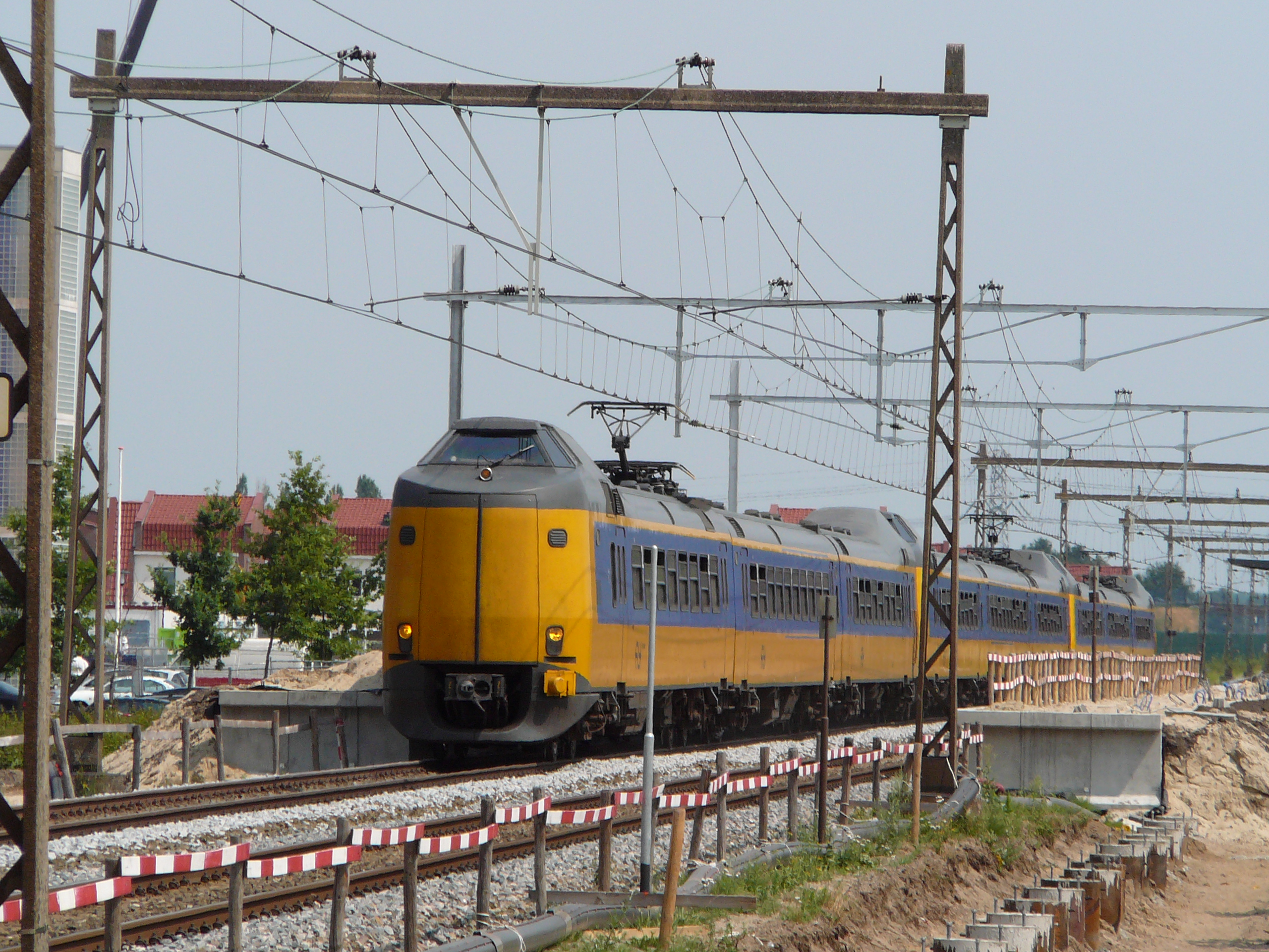 ICM 4025+4020+4048 Enschede-Amsterdam C./Schiphol, Apeldoorn Ossenveld, 20.07.2006